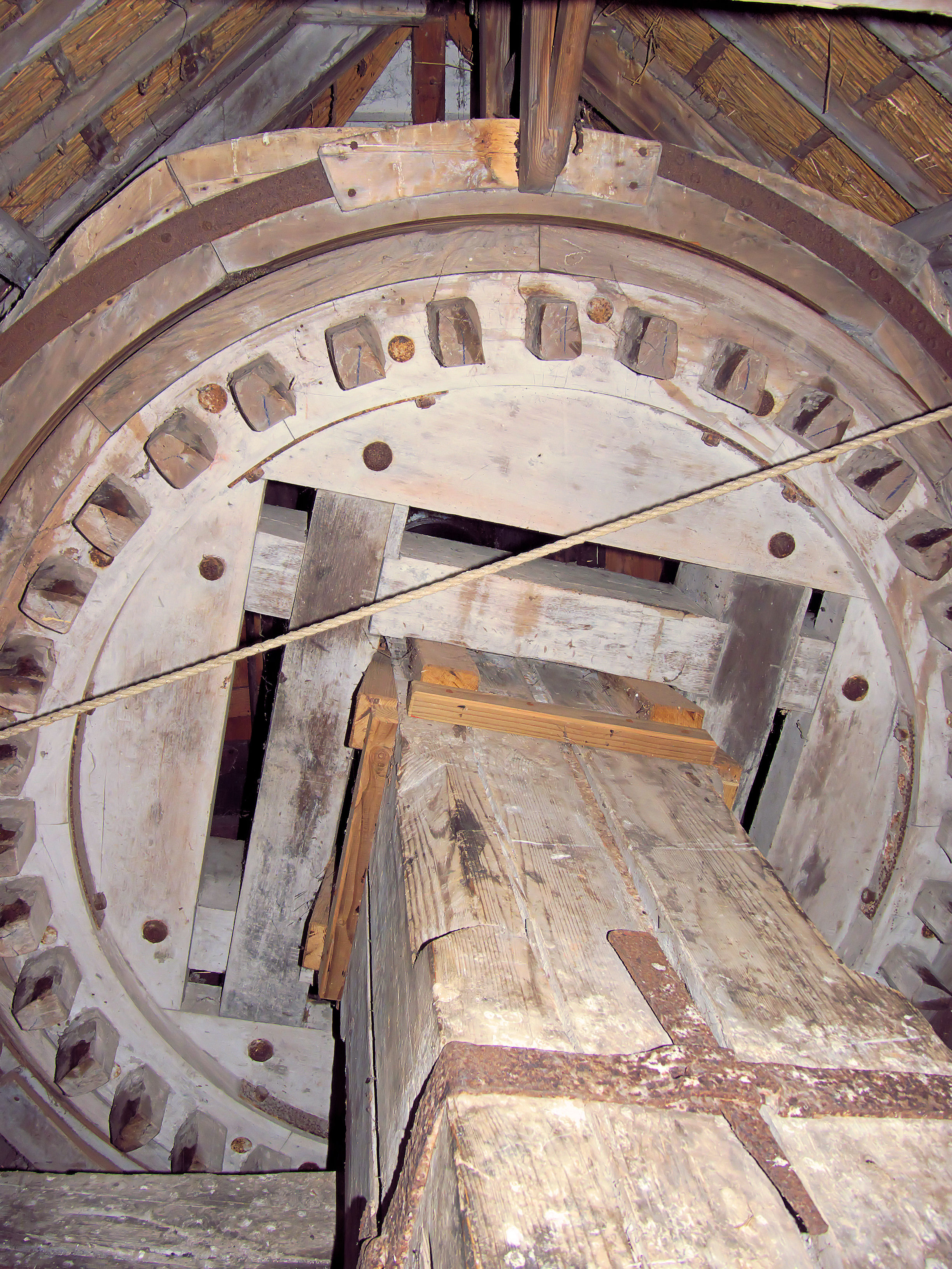 Krijtmolen d'Admiraal bovenwiel